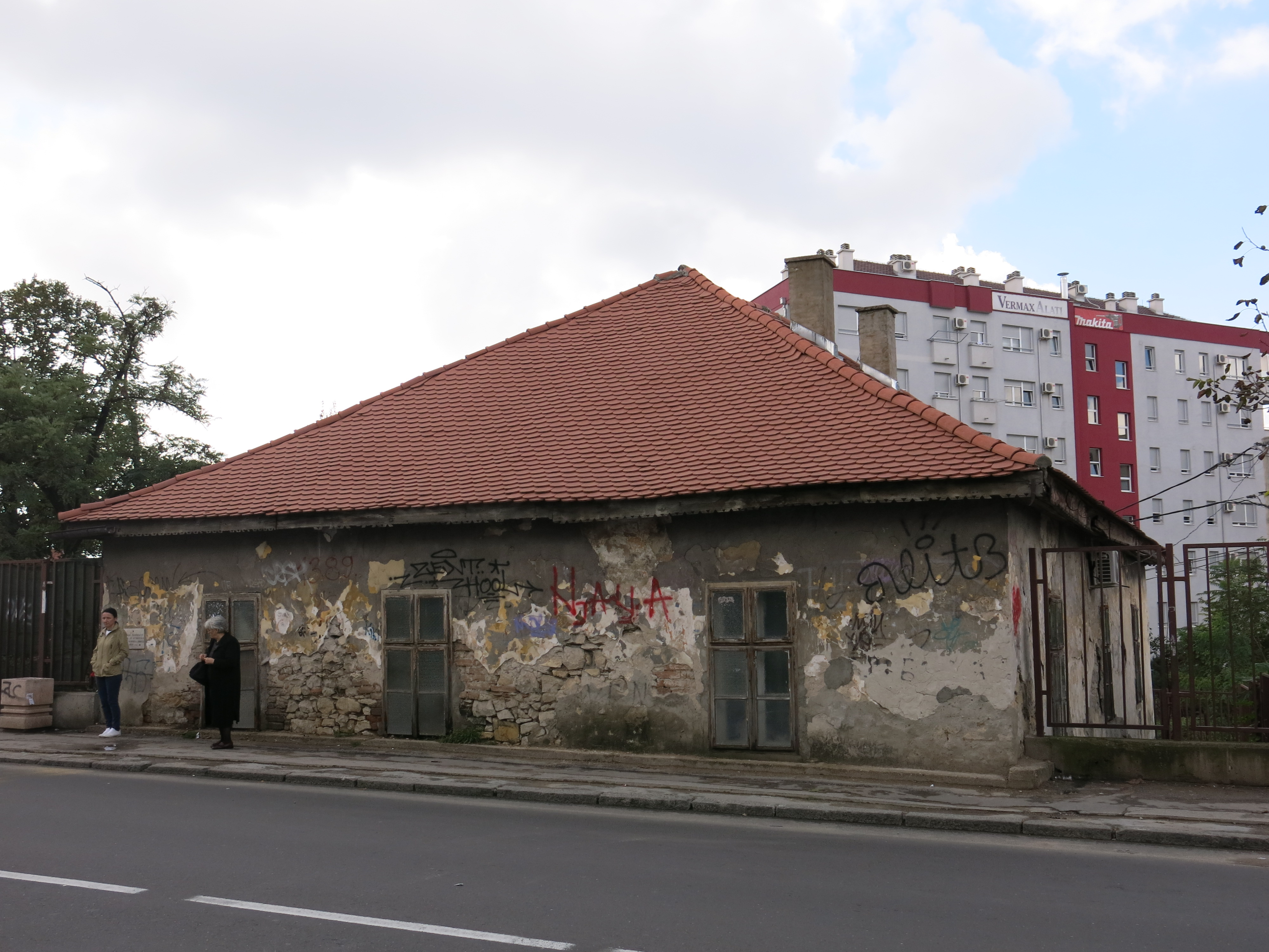 Стара школа у Жаркову